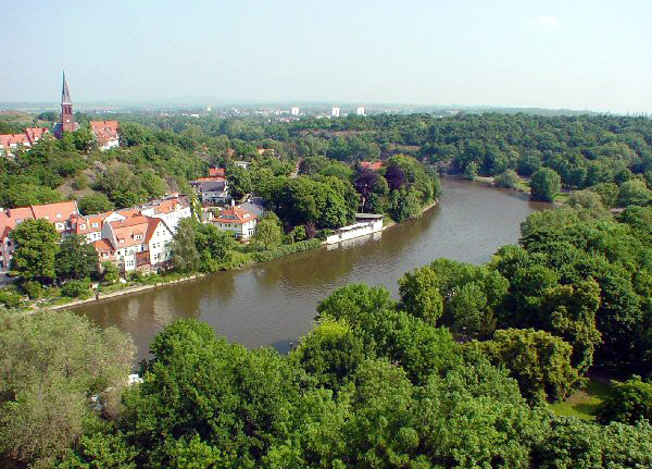 Halle (Saale), Saale bei Kröllwitz, eigenes Foto von 2005, public domain, Mewes 08:02, 24. Apr 2005 (CEST)